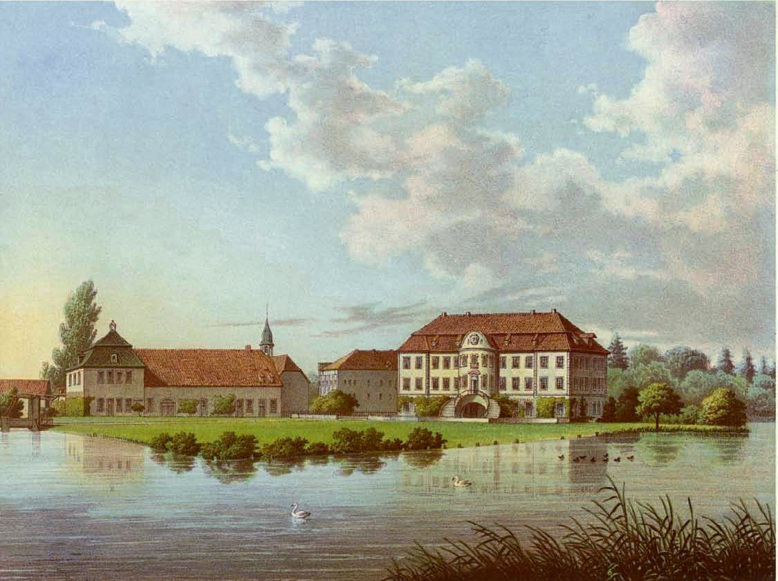 Farblitografie des Schlosses Harkotten; im Vordergrund: Schloss von Ketteler, im Hintergrund: Schloss von Korff